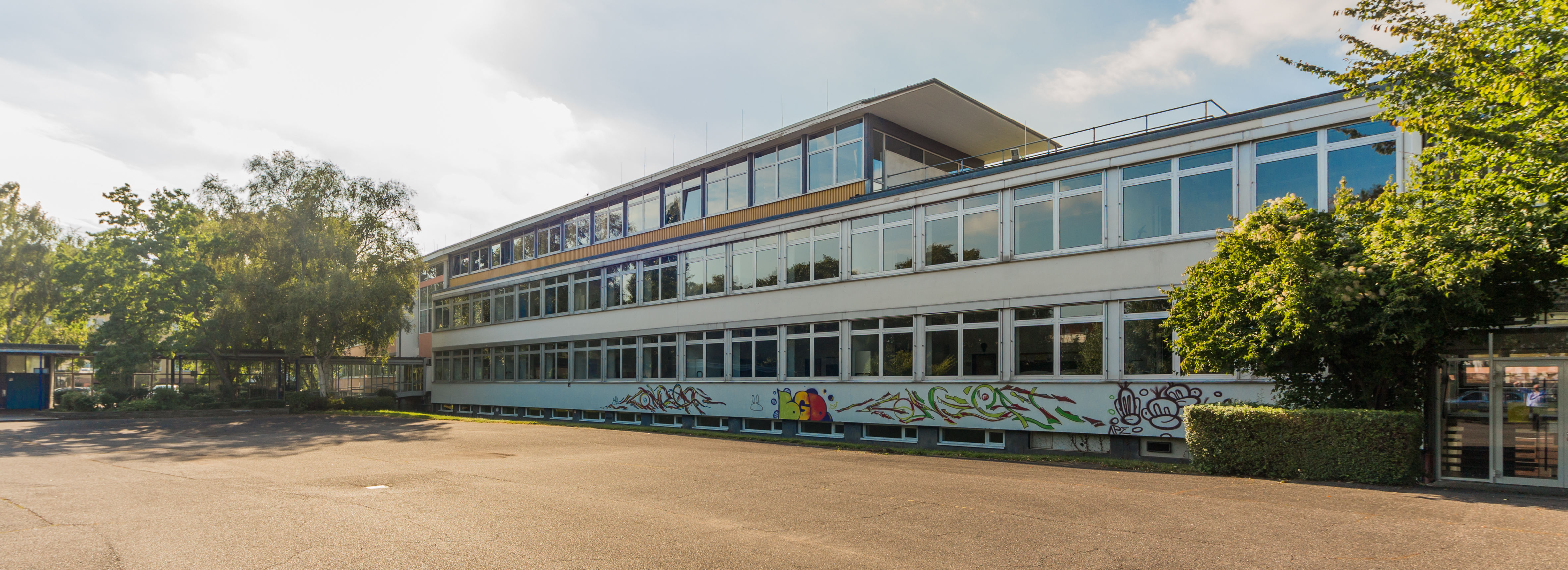 Weiterbildungskolleg, Langwartweg 72, Bonn-Dottendorf: Blickrichtung Westen